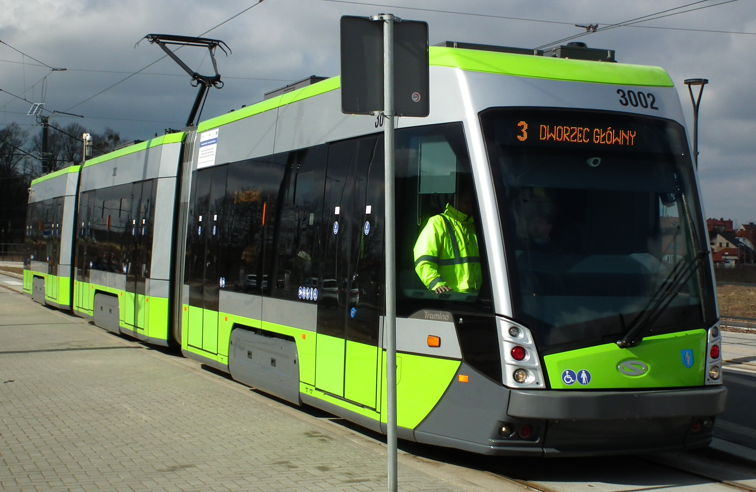 Tramwaje olsztyńskie A.D. 2016.